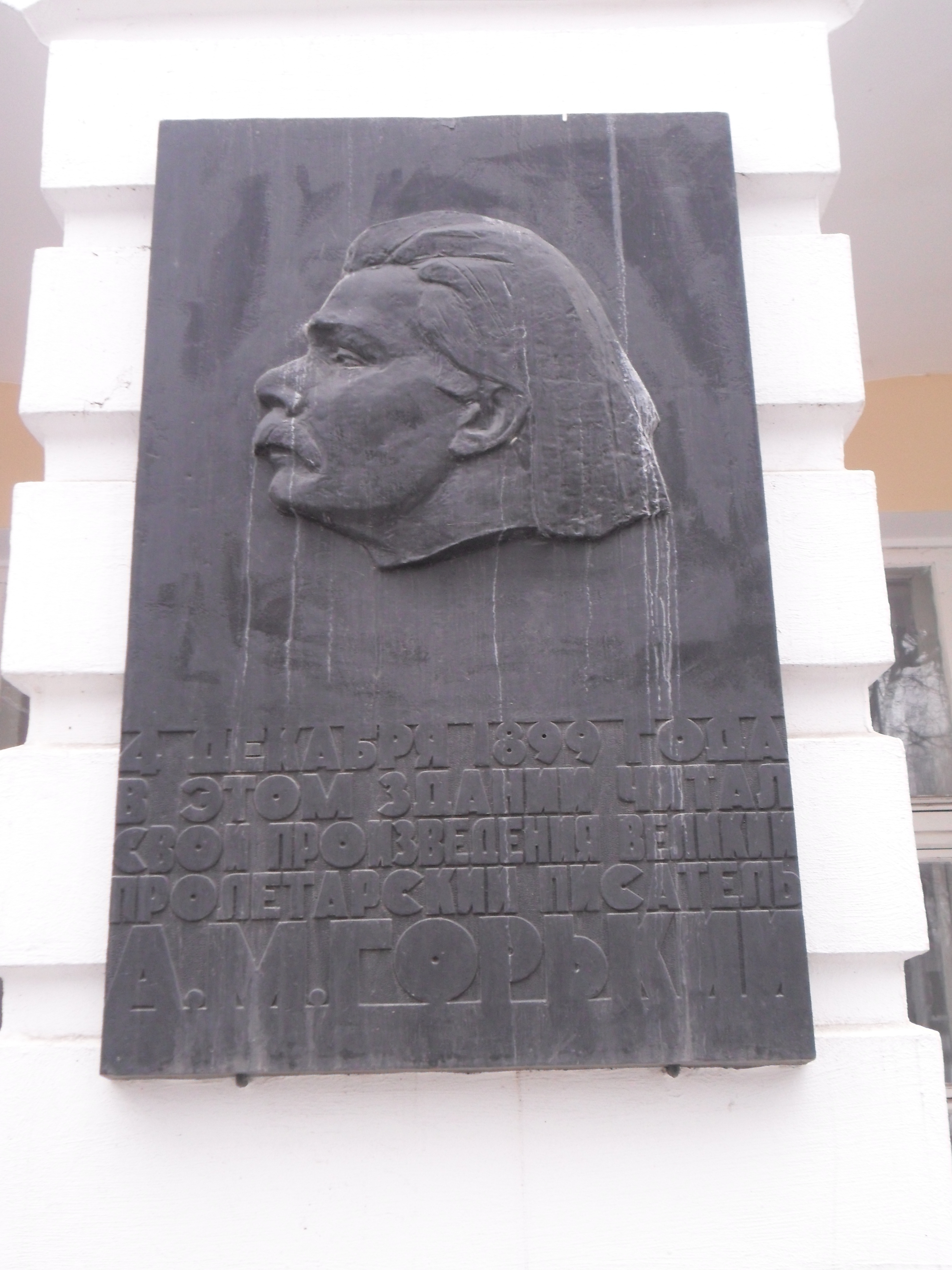 Мемориальная доска писателю Максиму Горькому на улице Глинки в Смоленске.